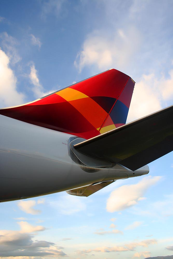 Cola del primer Airbus A330 de Avianca.